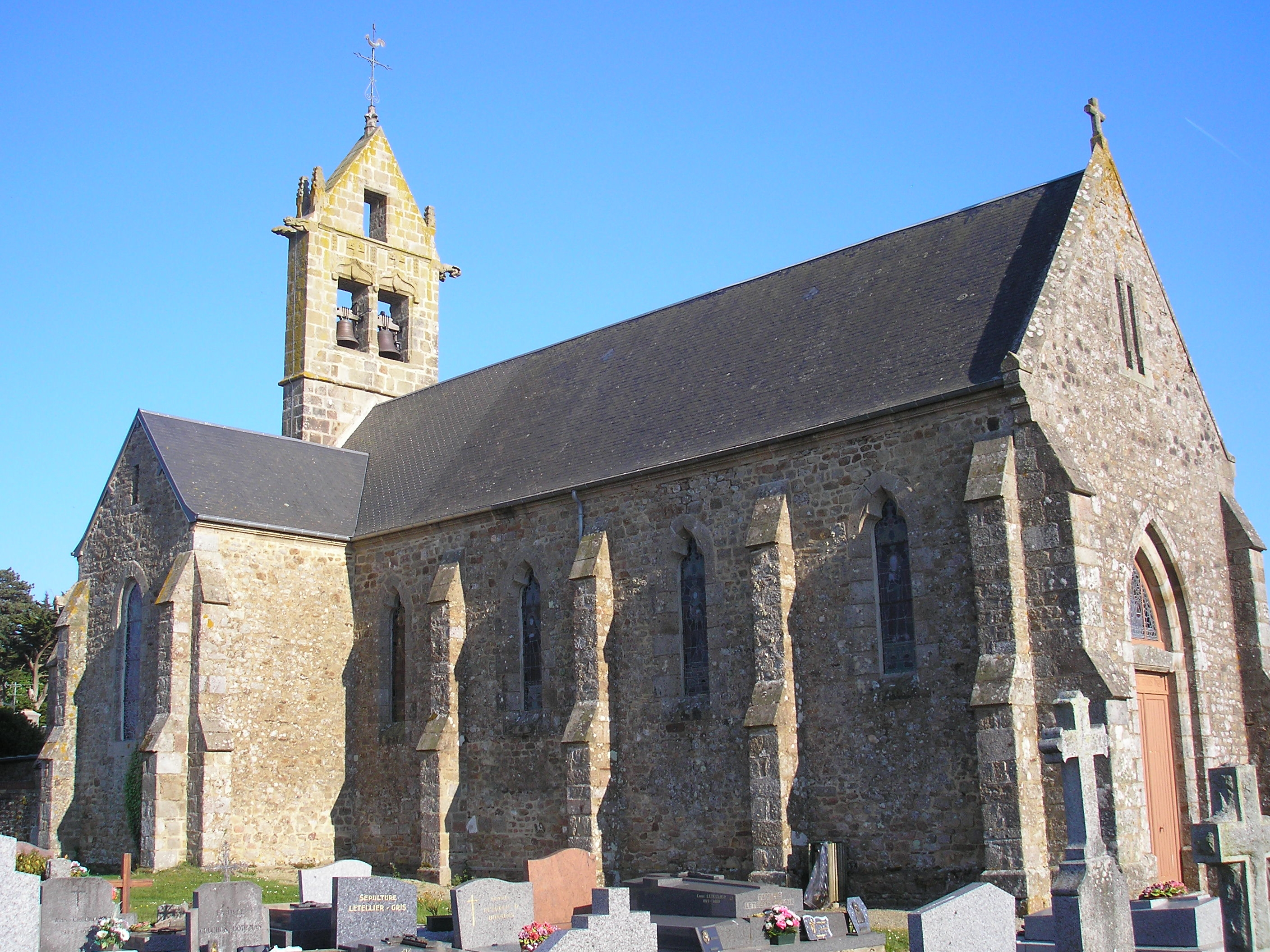 Champeaux (Normandie, France). L'église Saint-Vigor.